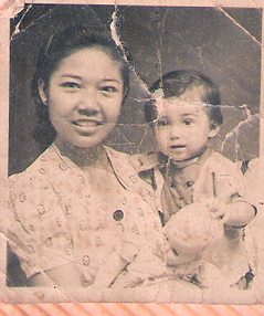 Ny. Soewarti istri Iswahjudi bersama keponakan